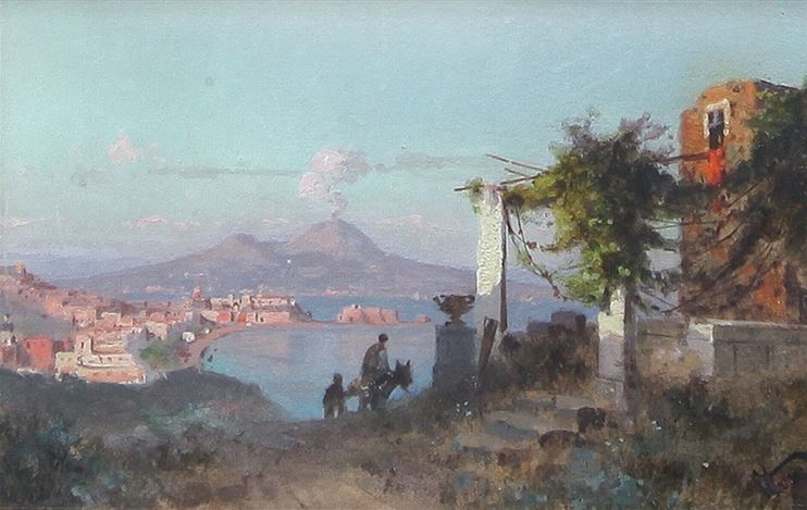 Veduta del Vesuvio, acquarello, 12 x 20 cm., coll. privata